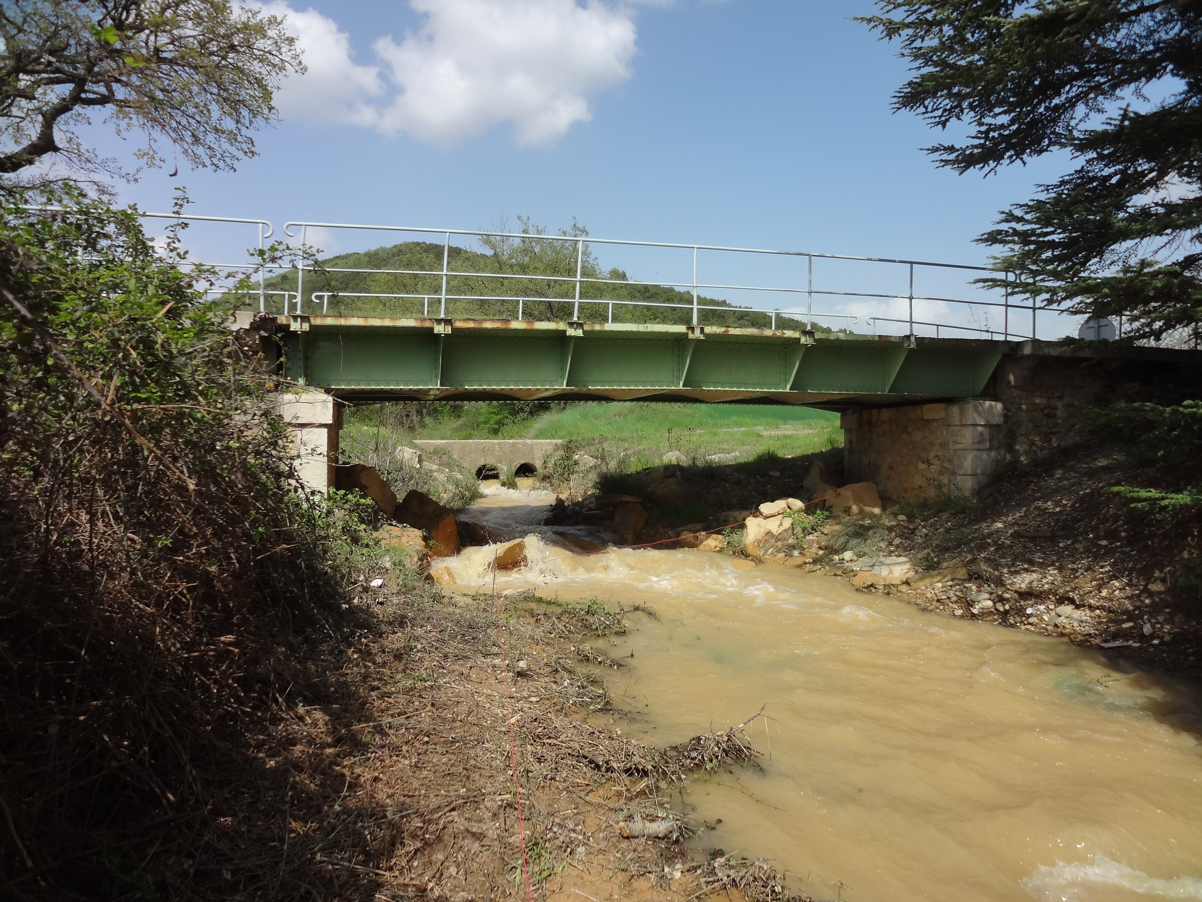 Pont du ravin de Puimichel, au Castellet, en crue, avec radier ancien en fond